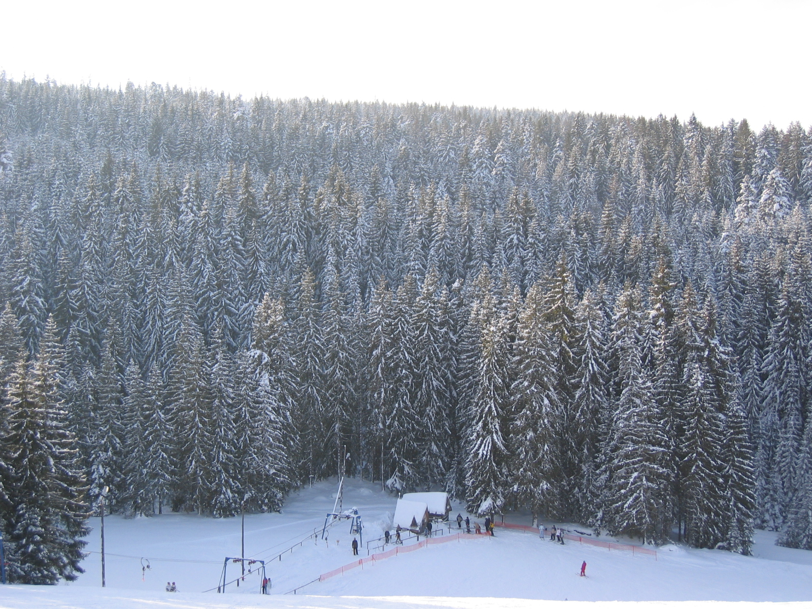 Bukowina Tatrzańska, Poland